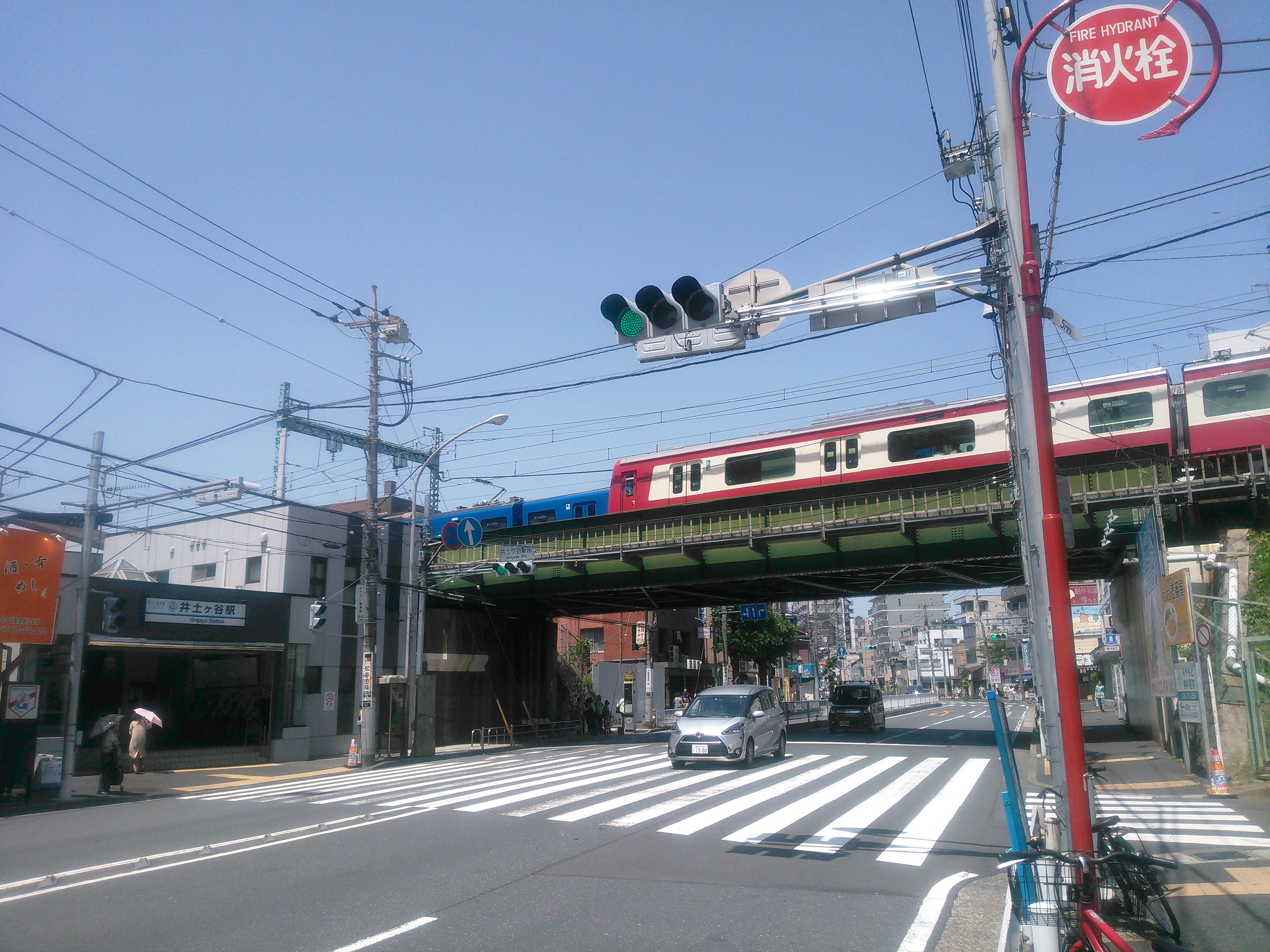 横浜市南区、環状1号線と京急本線が交差する井土ケ谷ガード。左側は井土ヶ谷駅。